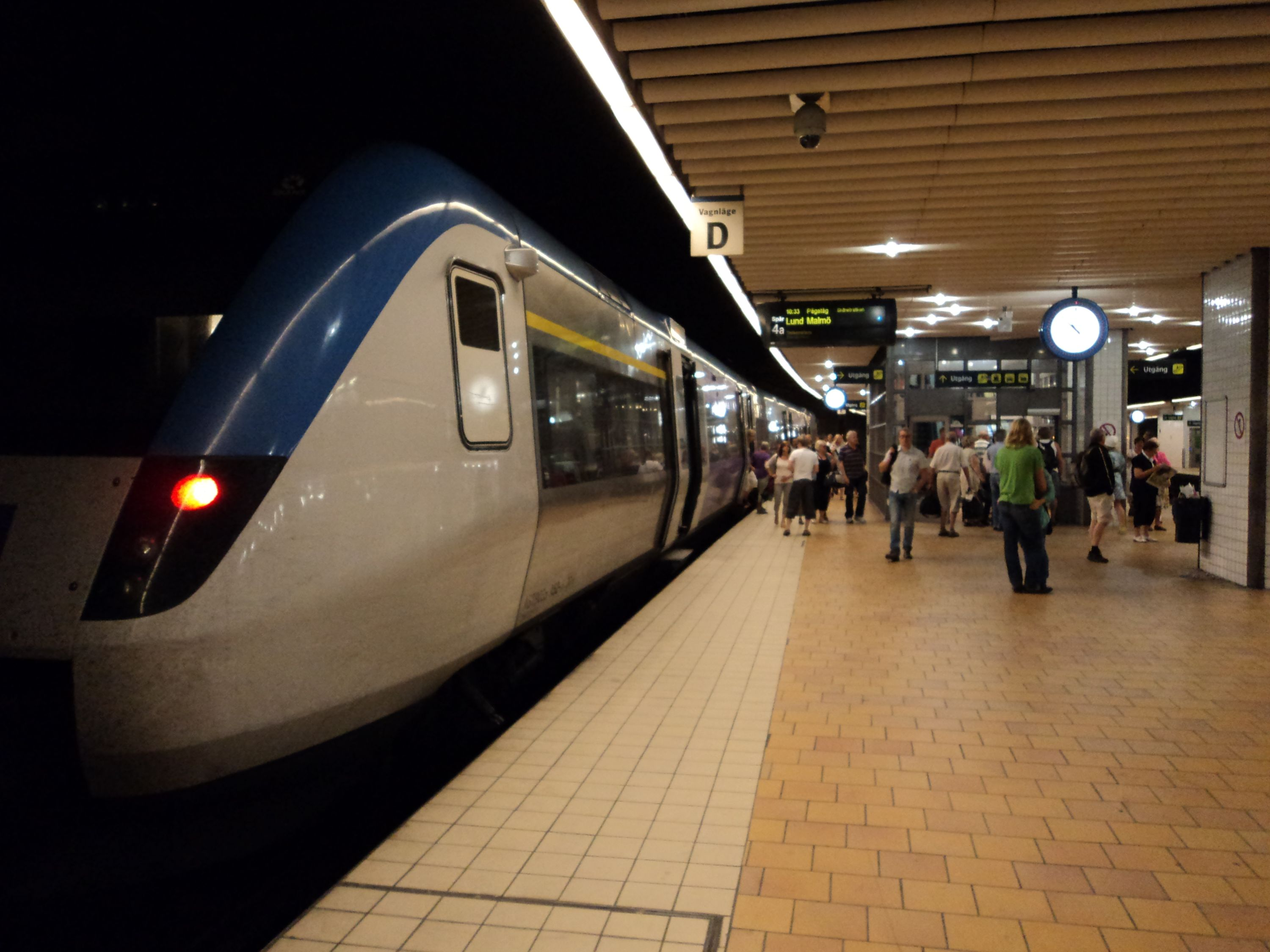 Ett vikarierande pågatåg på knutpunkten inväntar avgång mot Lund och Malmö via Teckomatorp. Foto 6 juli 2010